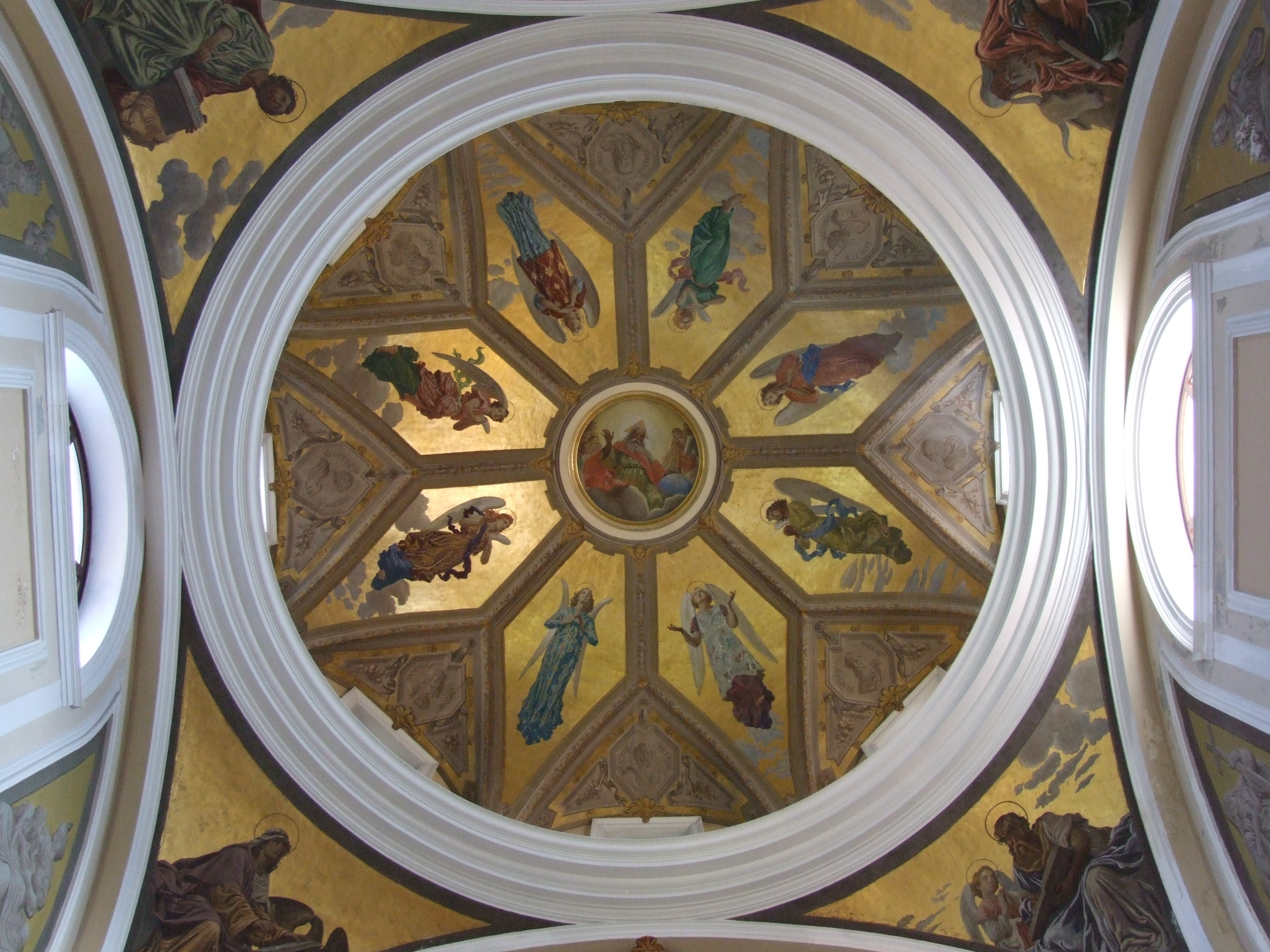 Kupola nad prezbiterijem župnijske cerkve Sv.Mavra